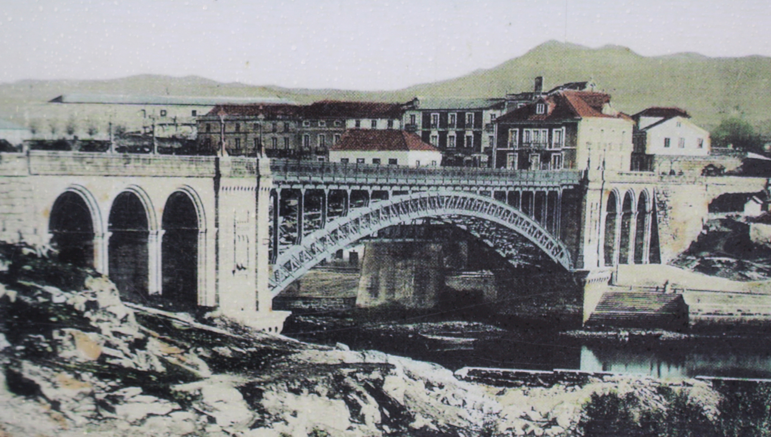 A Ponte da Barca, en Pontevedra, fotografada por Francisco Zagala (1842-1908)